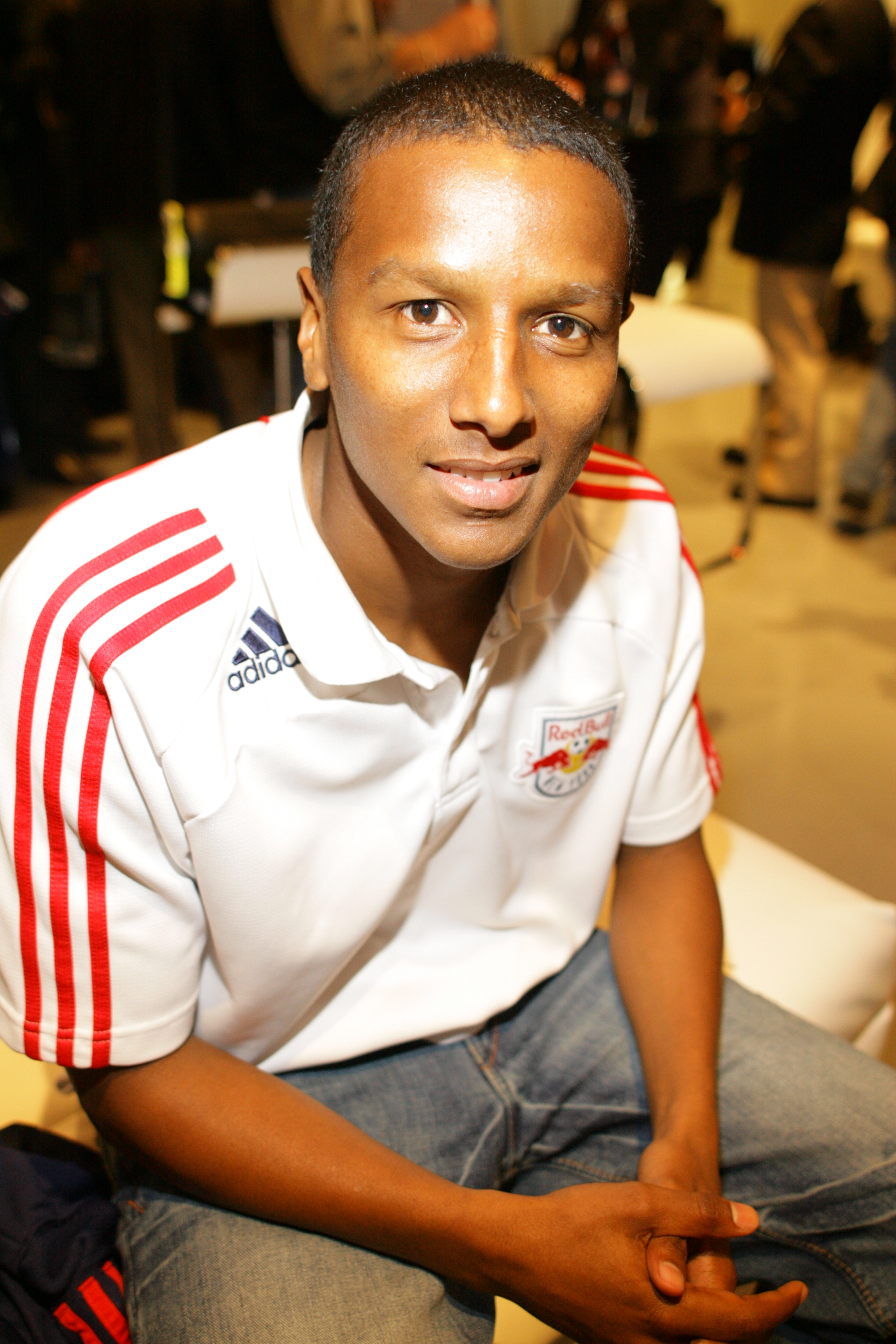 Danleigh BORMAN #12, Midfielder